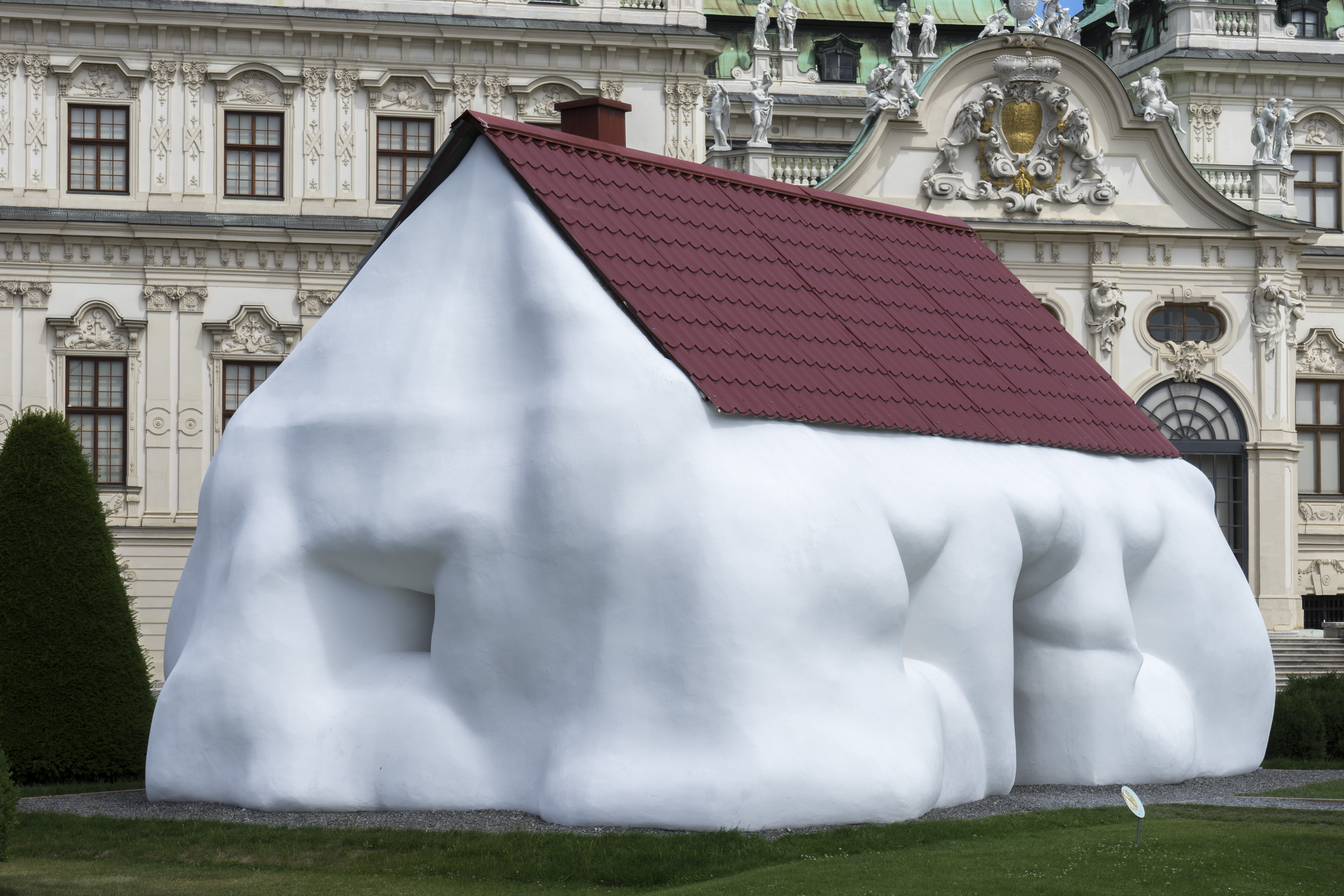 Fat House, Erwin Wurm im Garten des oberen Belvedere